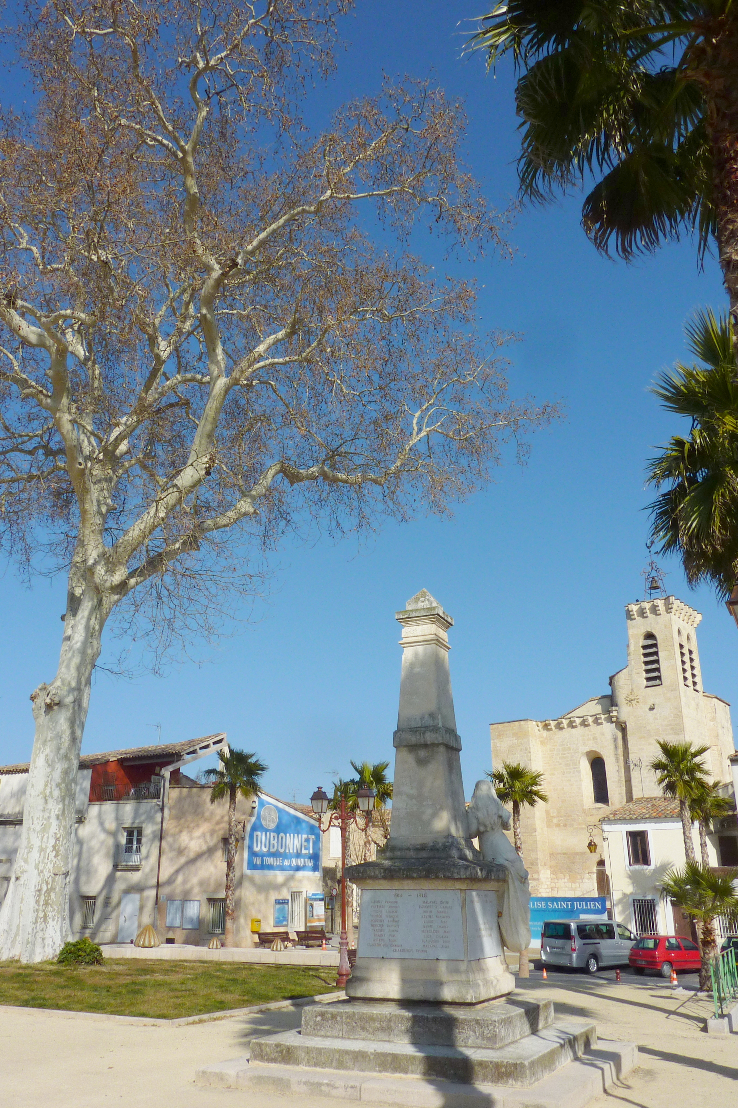 Kriegerdenkmal und Platz vor der Kirche Saint-Julien in Baillargues